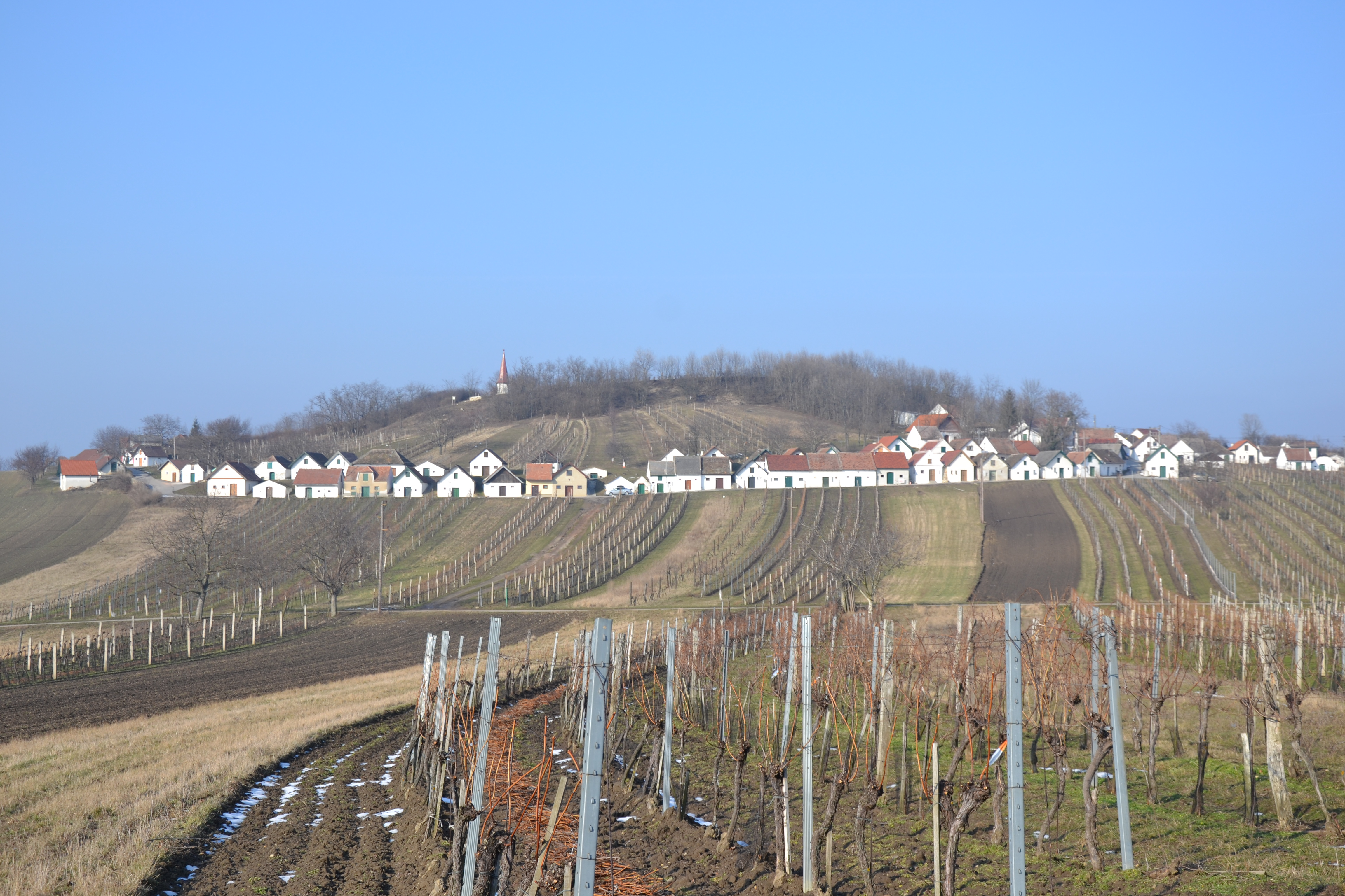 Wildendürnbach, Kellergasse "Galgenberg" im Winter